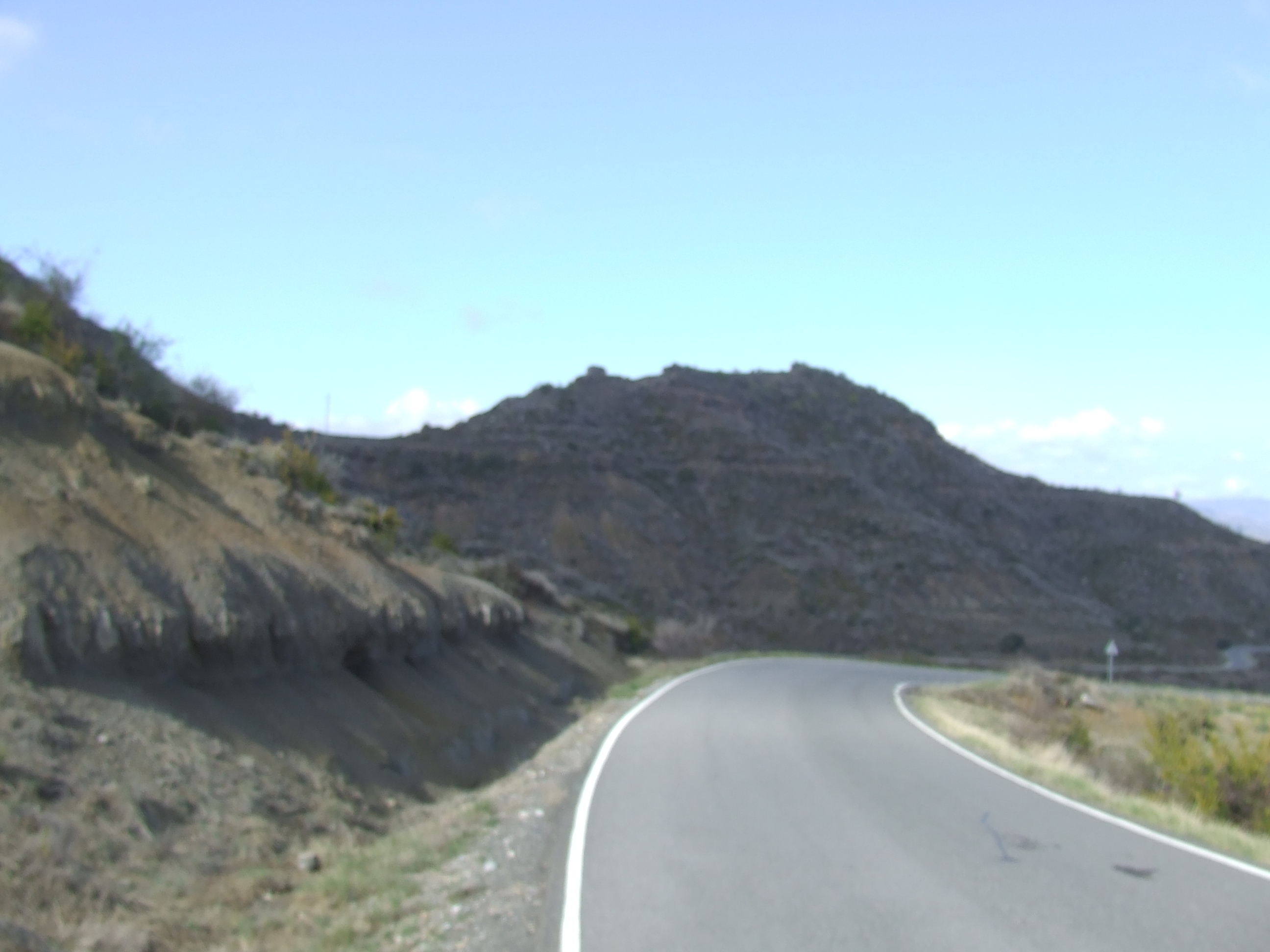 La C-1311 al seu pas per Montserbós (Fígols de Tremp, Tremp, Pallars Jussà)